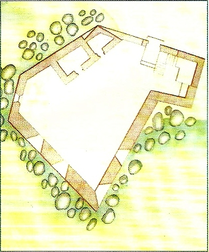 Forte de Santa Cruz. MACHADO, Francisco Xavier. "Revista dos Fortes e Redutos da Ilha Terceira" (1772). in MARTINS, José Salgado, "Património Edificado da Ilha Terceira: o Passado e o Presente". Separata da "Atlântida", vol. LII, 2007. p. 49.